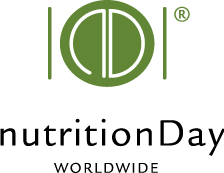 nutritionDay worldwide Logo